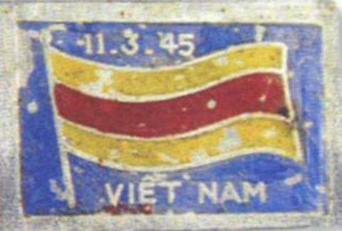 The Dragon Spirit Flag of Nguyen Dynasty, used by Emperor Bảo Đại since 11 March to 30 August 1945.